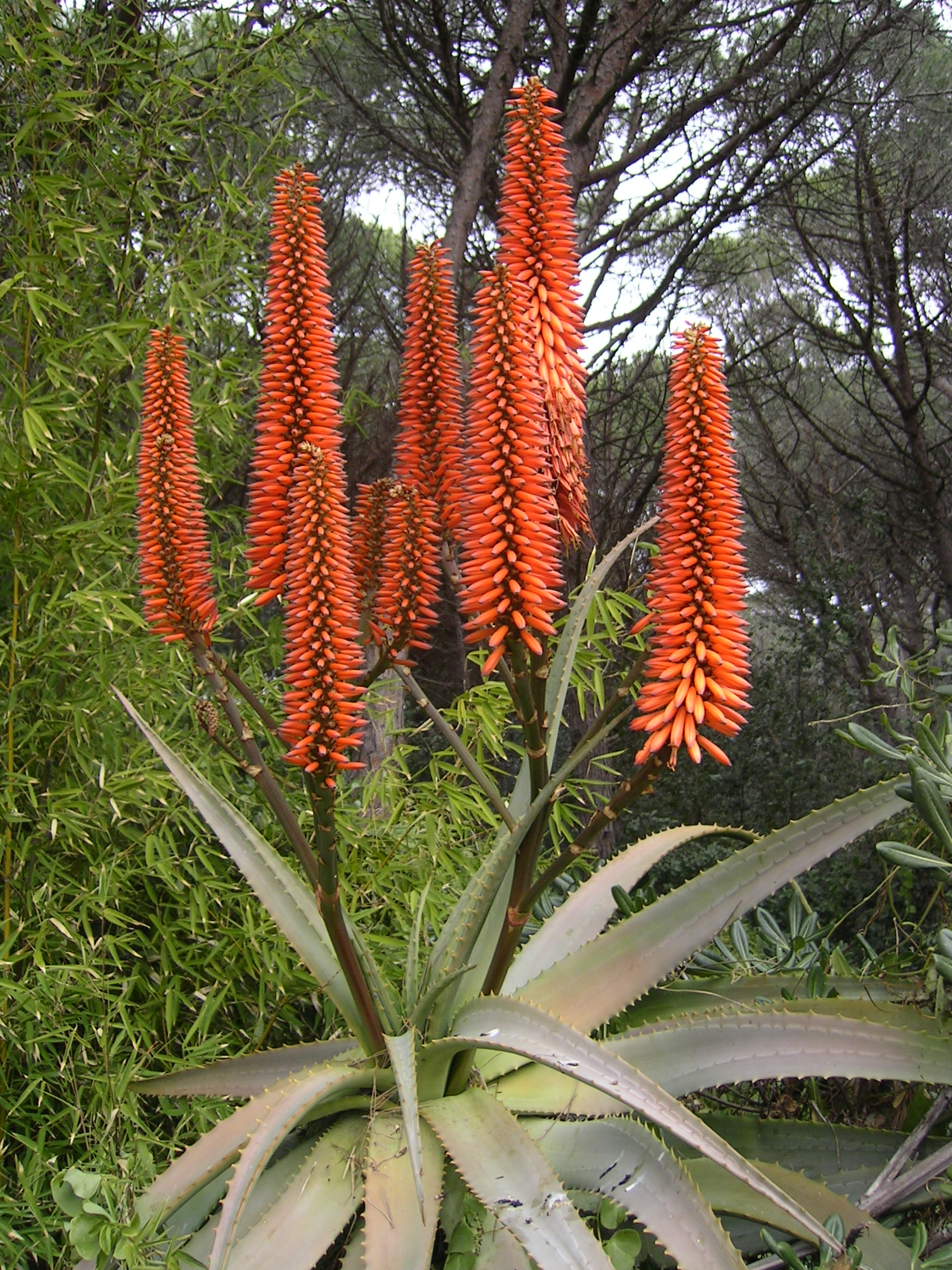 Aloe ferox, Aspodelaceae